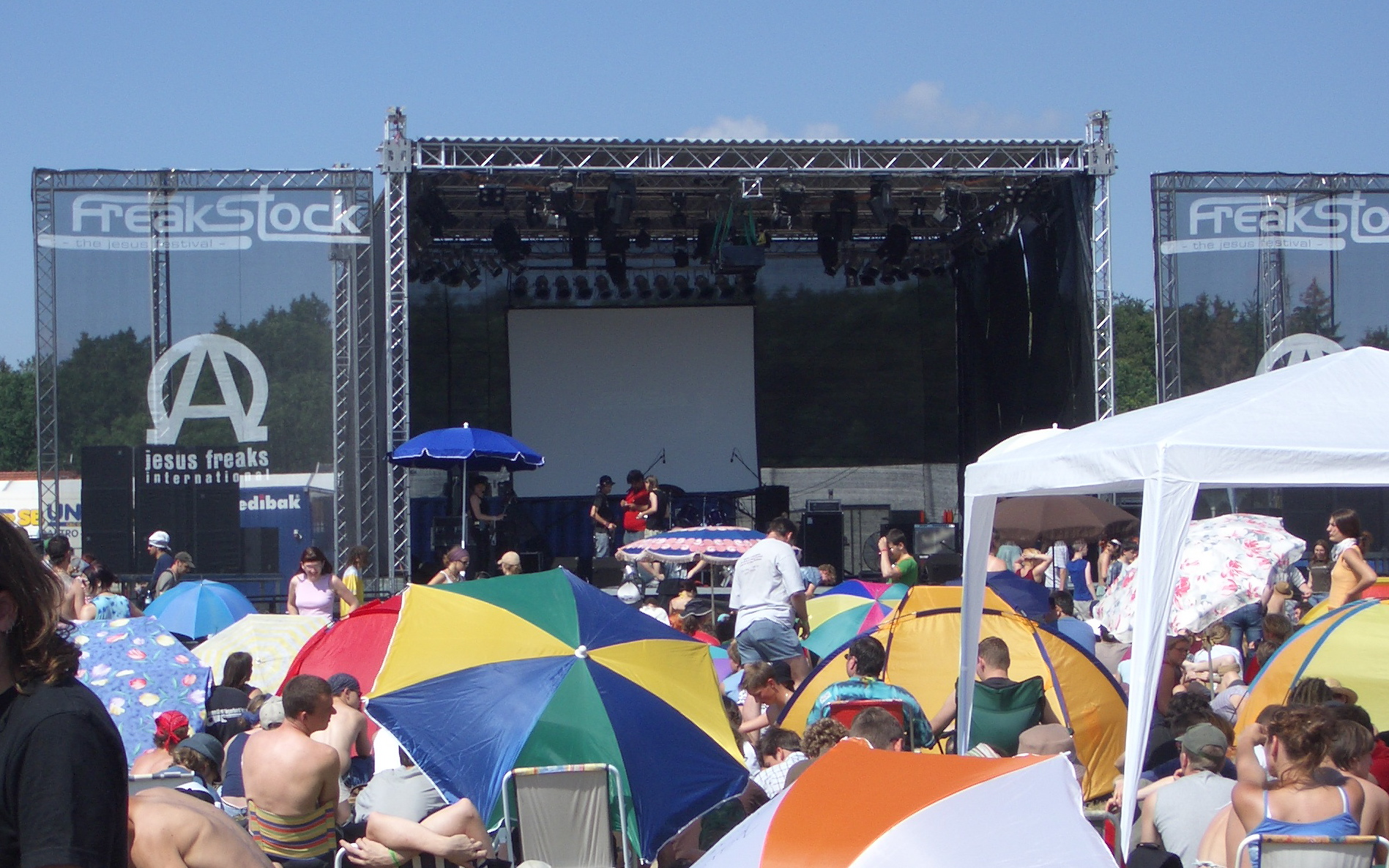 Eigene Fotografie August 2004